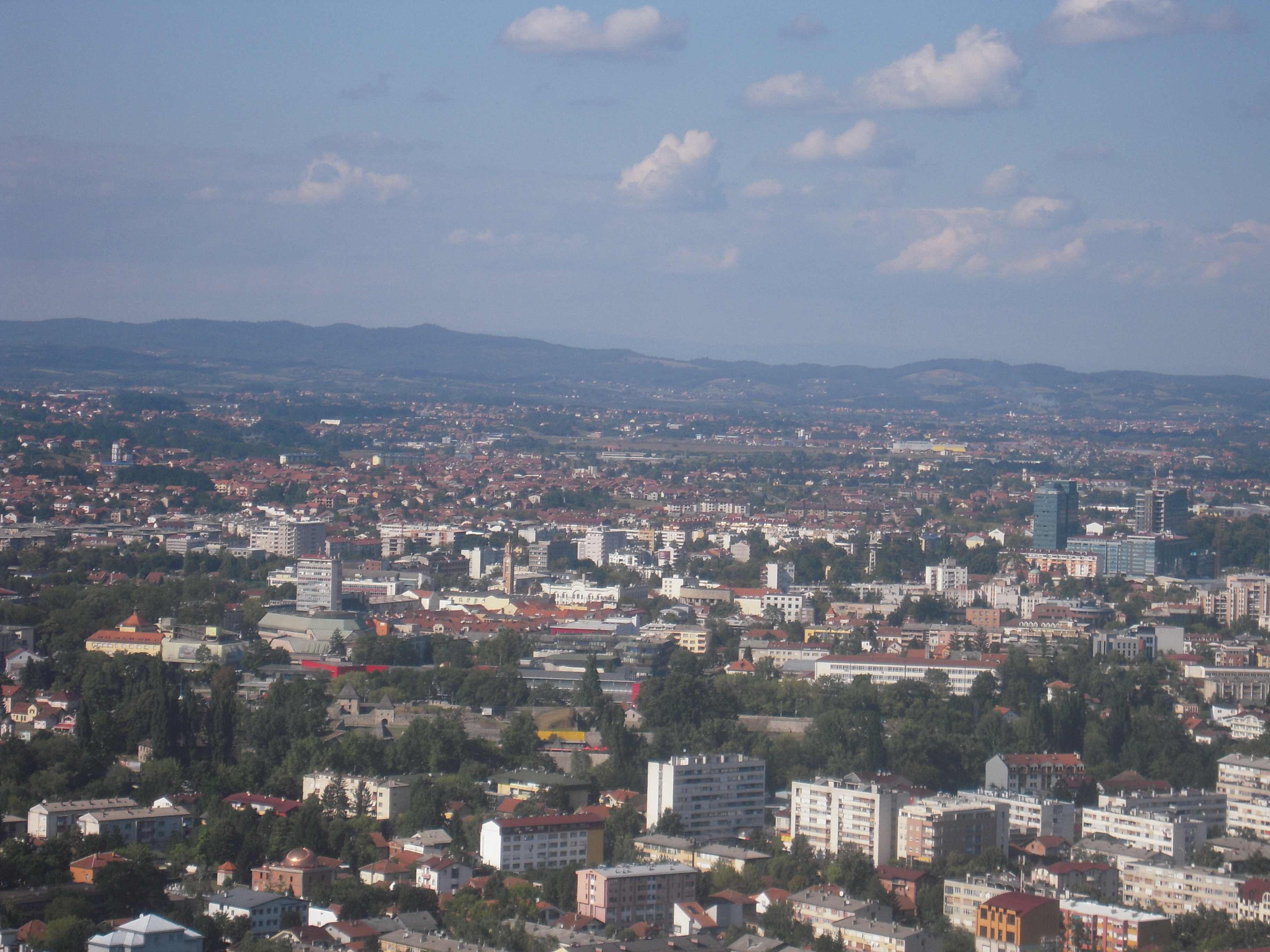 Banjaluka